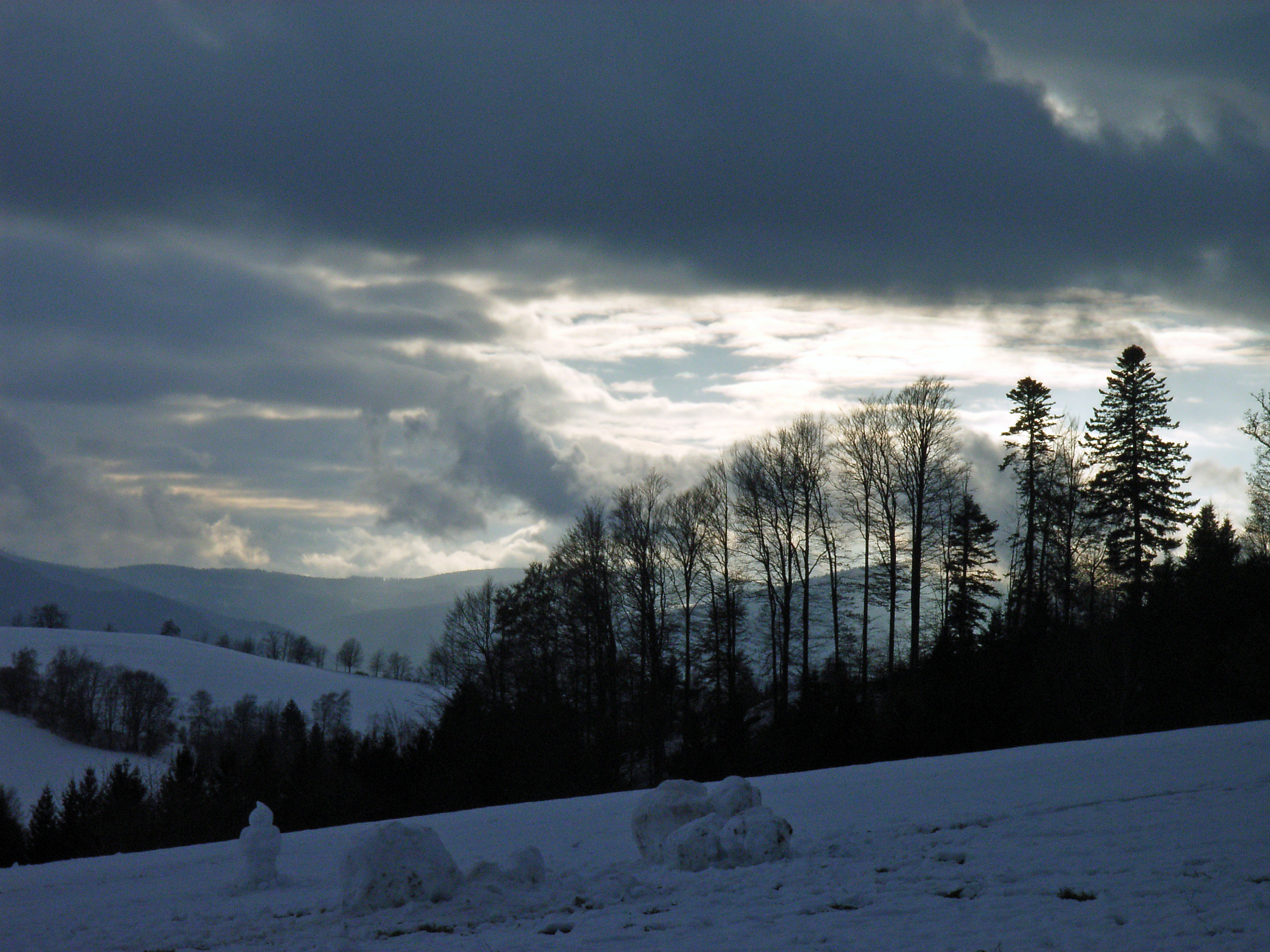 Winterlandschaft (Schwarzwald)